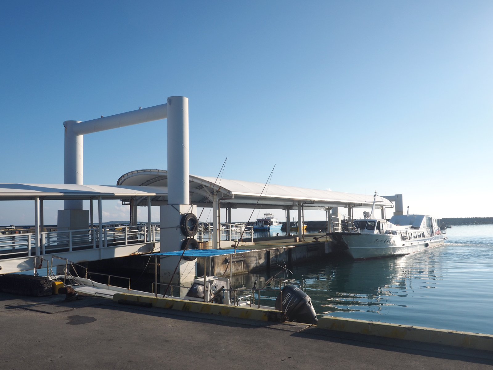 上原港浮桟橋（沖縄県八重山郡竹富町西表島）